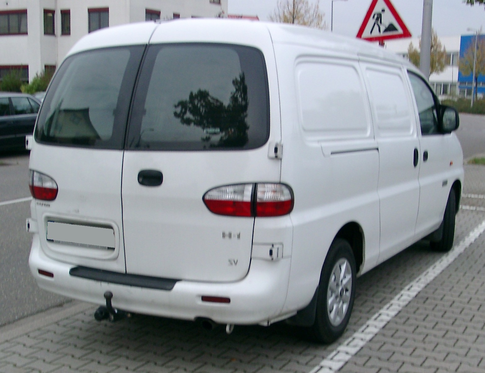 Hyundai H-1